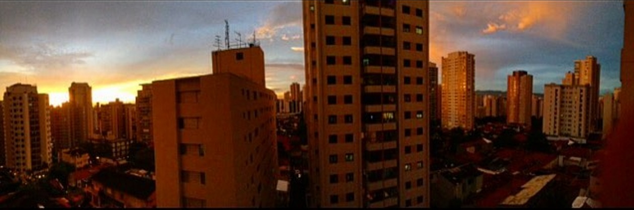 Vista panoramica Vila Pompeia, São Paulo, durante o por do Sol.